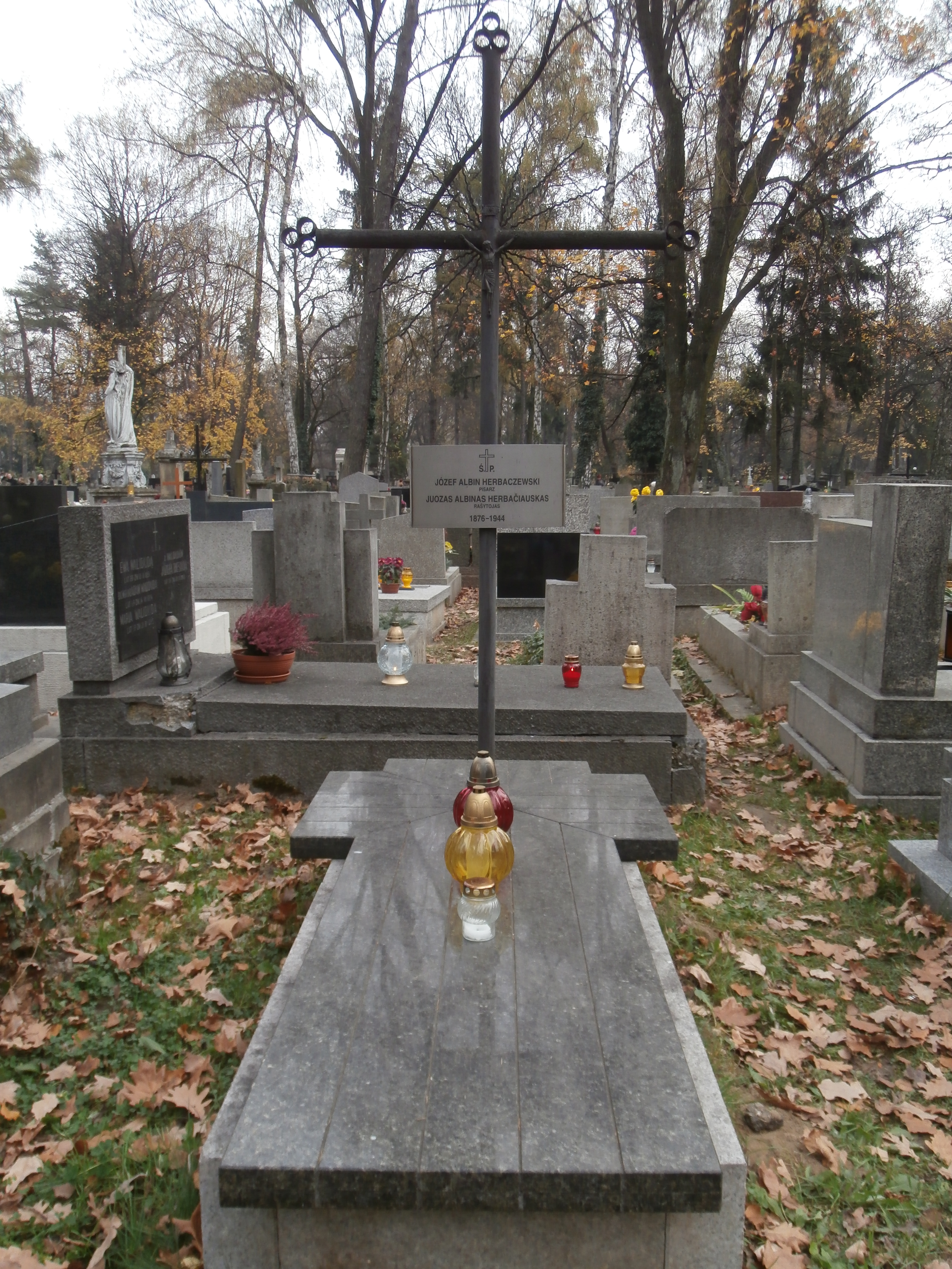 Grób Józefa Albina Herbaczewskiego na Cmentarzu Rakowickim w Krakowie.